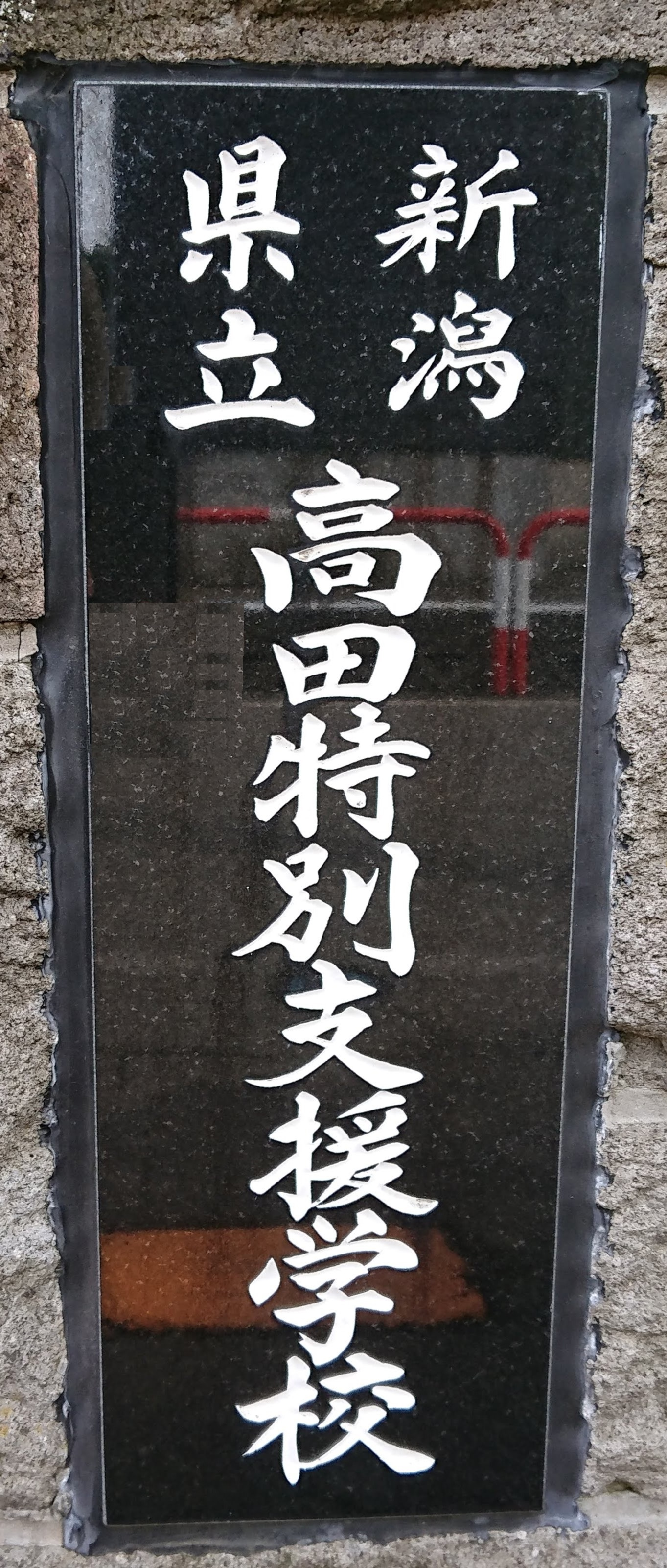 新潟県立高田特別支援学校の学校表示